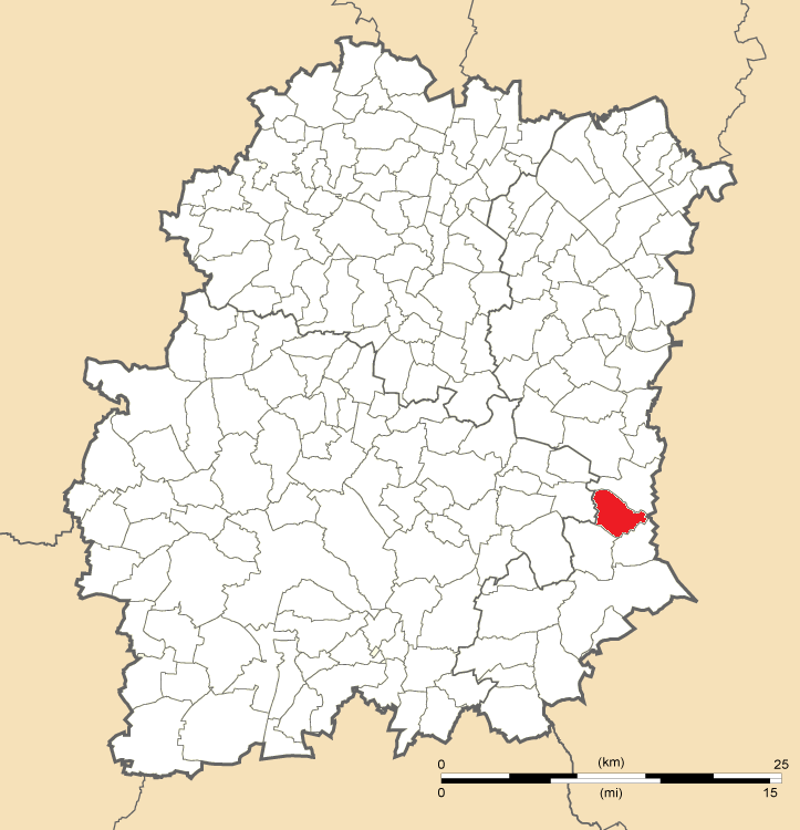 Carte de position de Dannemois en Essonne.